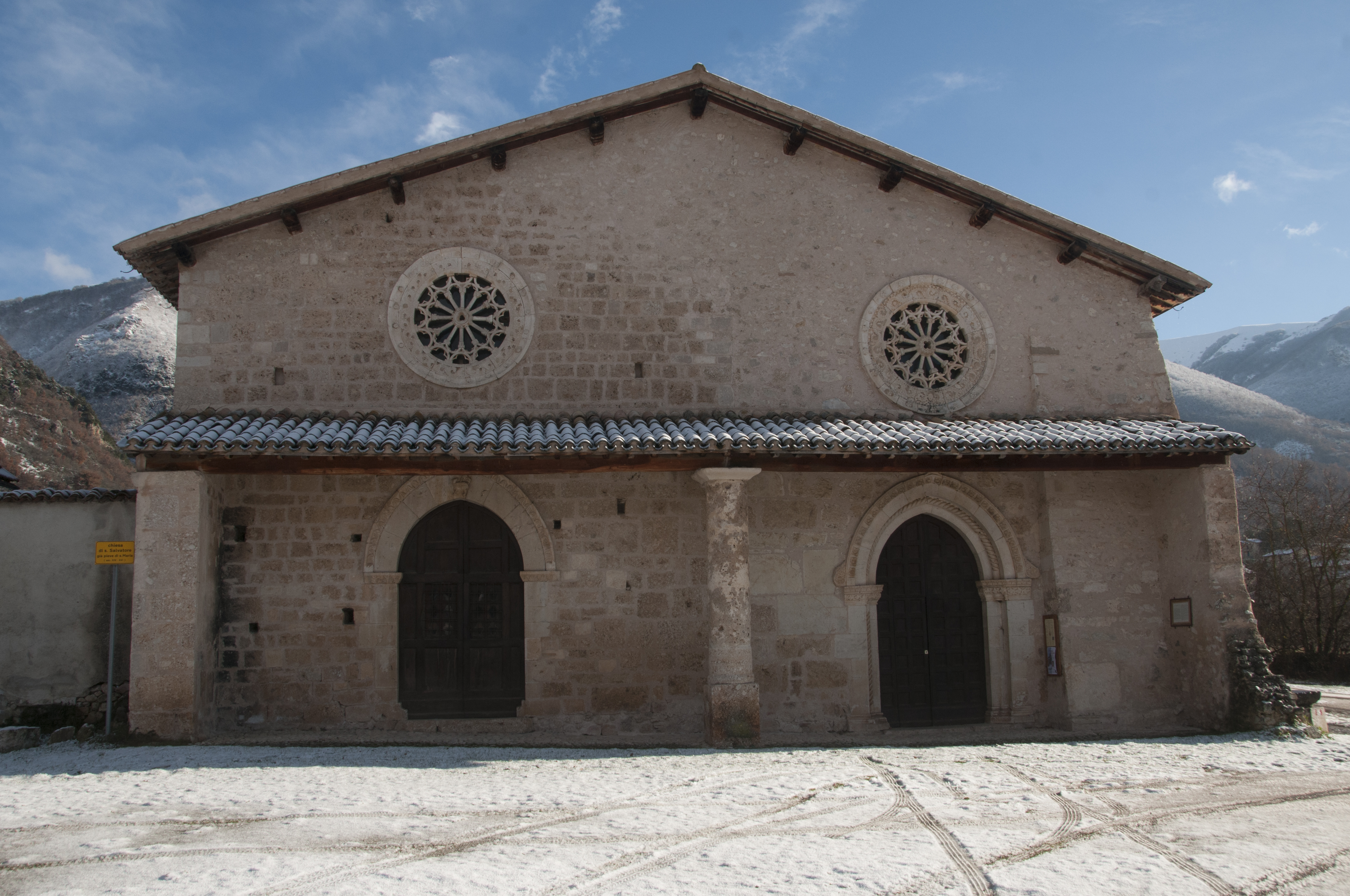 Chiesa di San Salvatore Campi